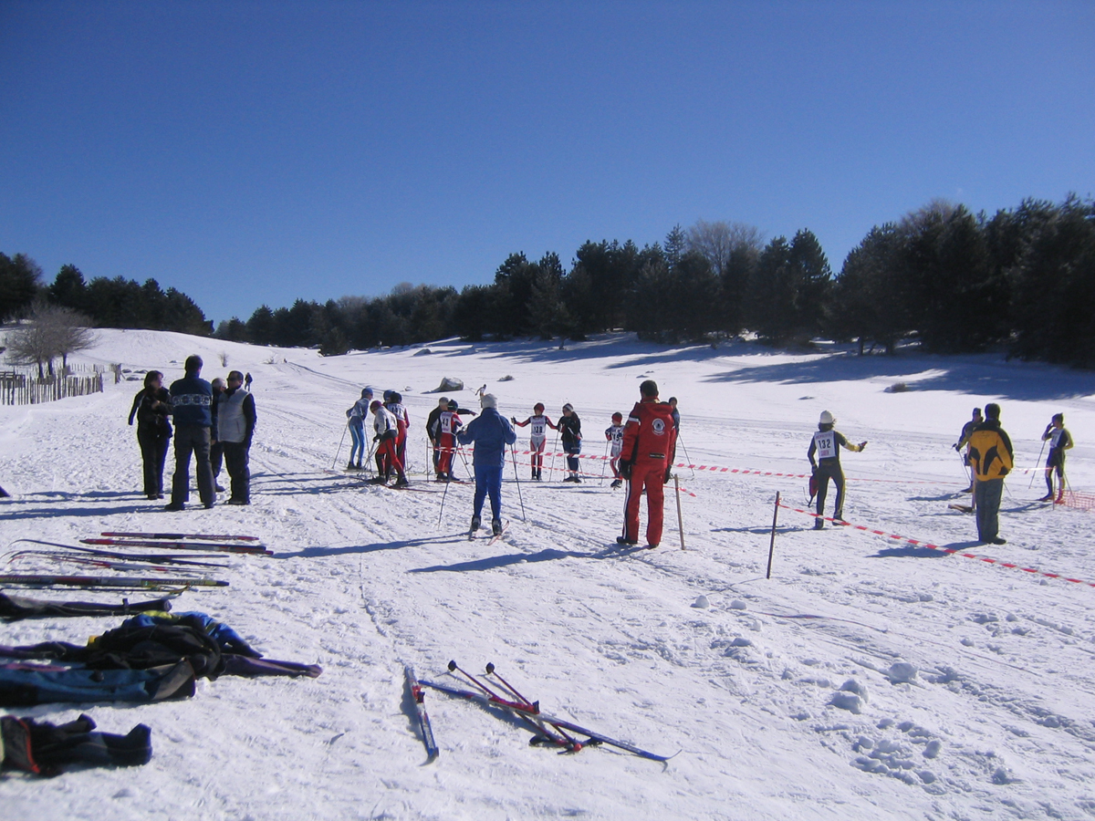 Carlomagno di San Giovanni in Fiore. Piste da sci da fondo. Gara interregionale